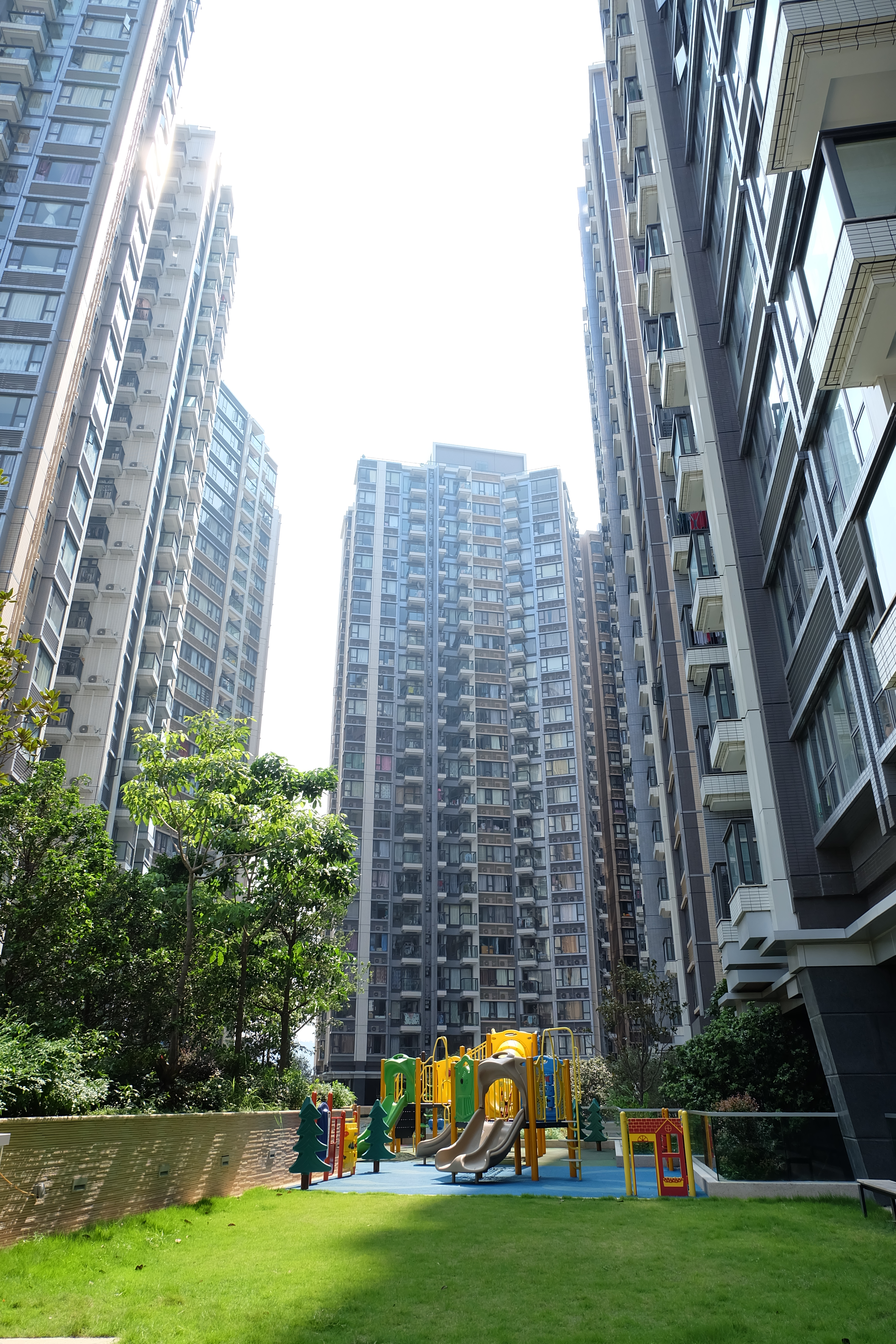 溱柏內園狀況